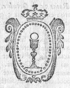 Escudo de Galiza no Diario de Santiago.